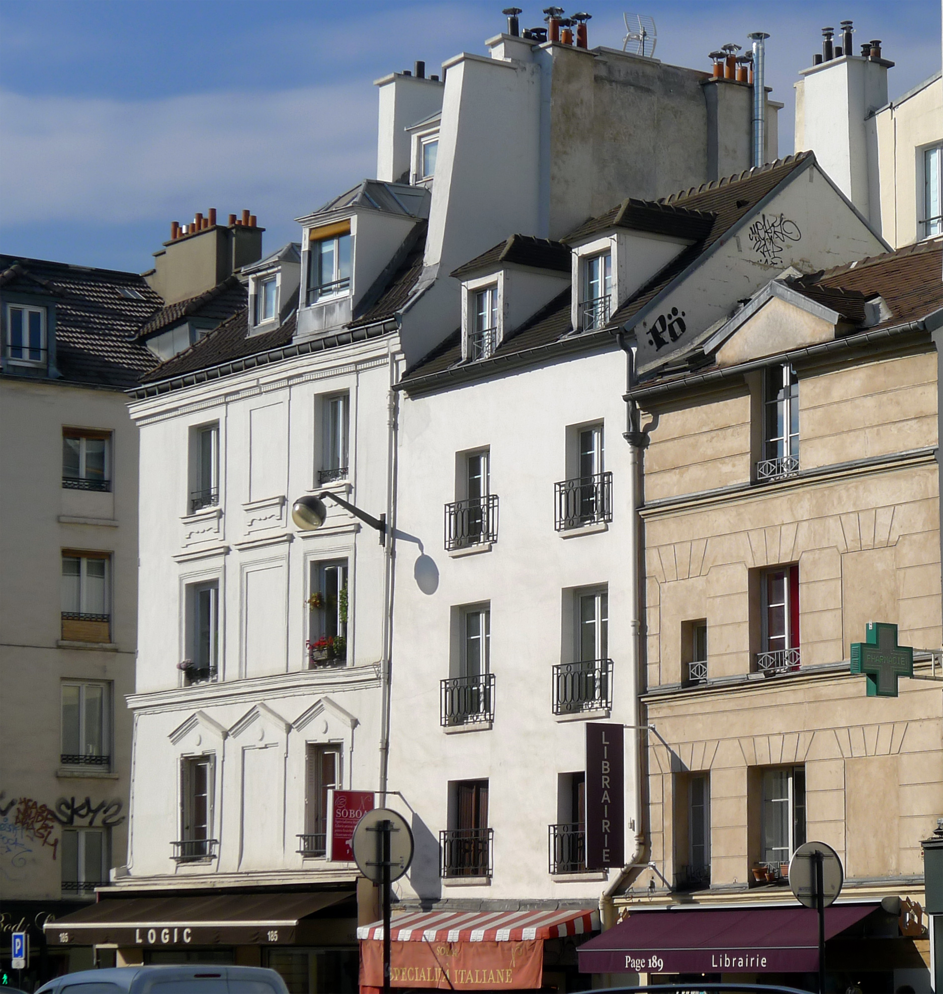 Rue du Faubourg-Saint-Antoine (n°185, 187 et 189 : maisons à pignon) - Paris XI